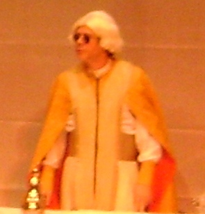 Hugo Possolo, ator brasileiro, na peça "Missa do Galho" no Espaço Parlapatões, em São Paulo.